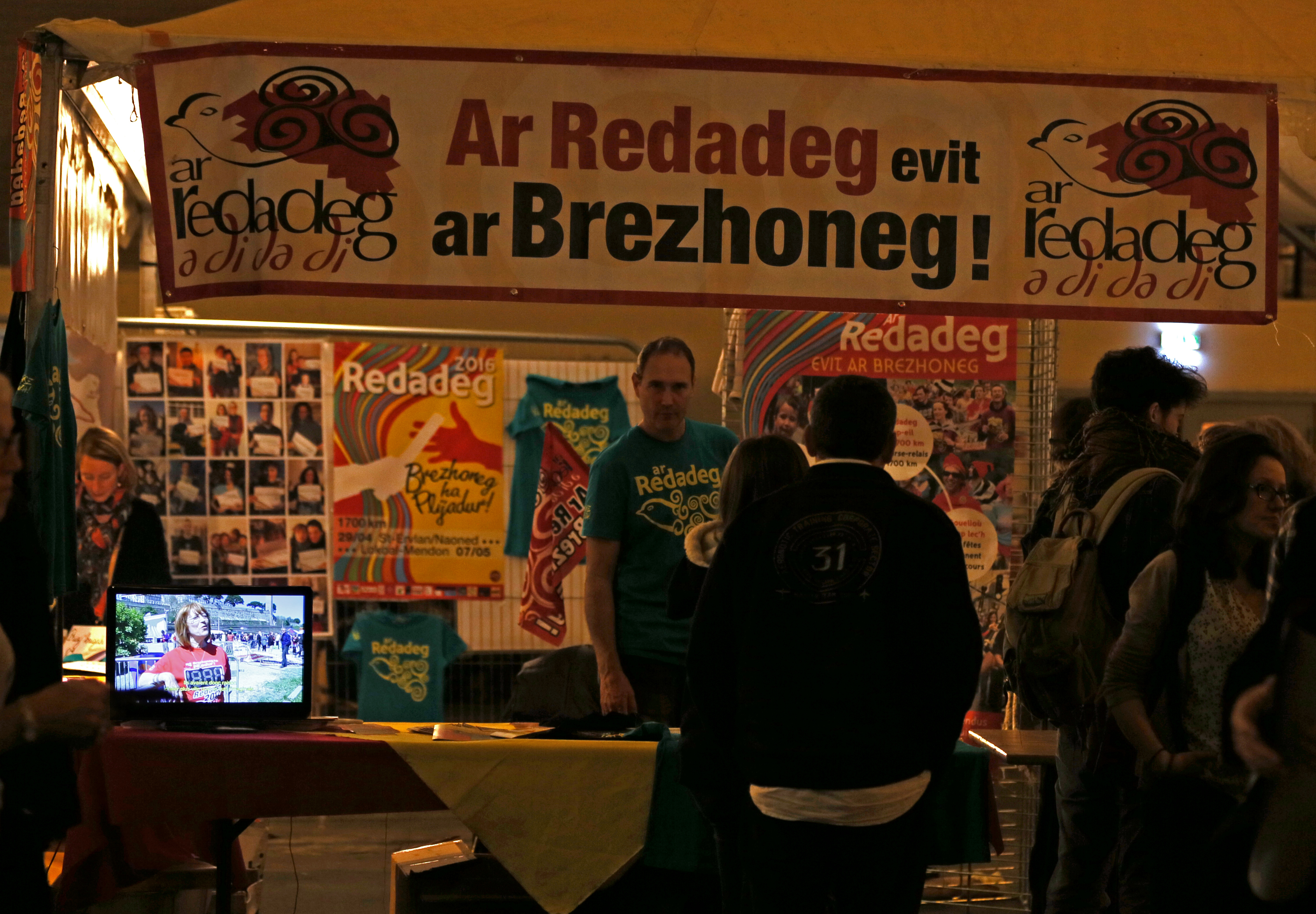 Stand pour la course Ar Redadeg 2016 lors du festival Yaouank le 21 novembre 2015 au Parc des Expositions de Rennes.